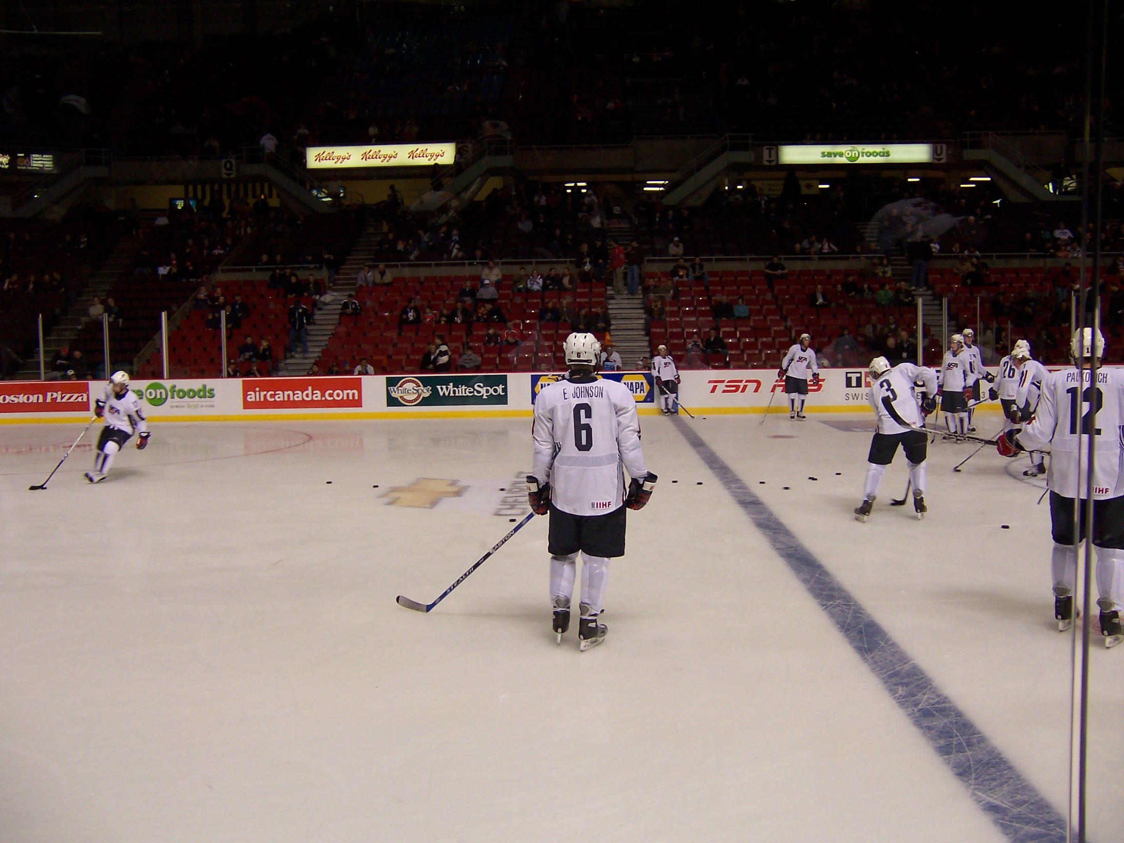 Erik Johnson (#1 pick in the 2006 NHL draft)